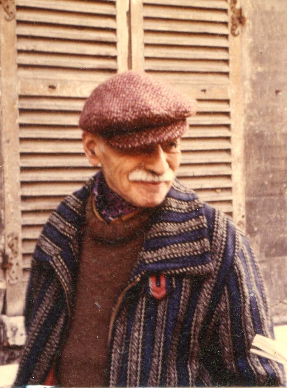 Le peintre chilien Eudaldo quittant son logement dans la maison d'Eugène Delacroix, Saint-Maurice, France, 1985